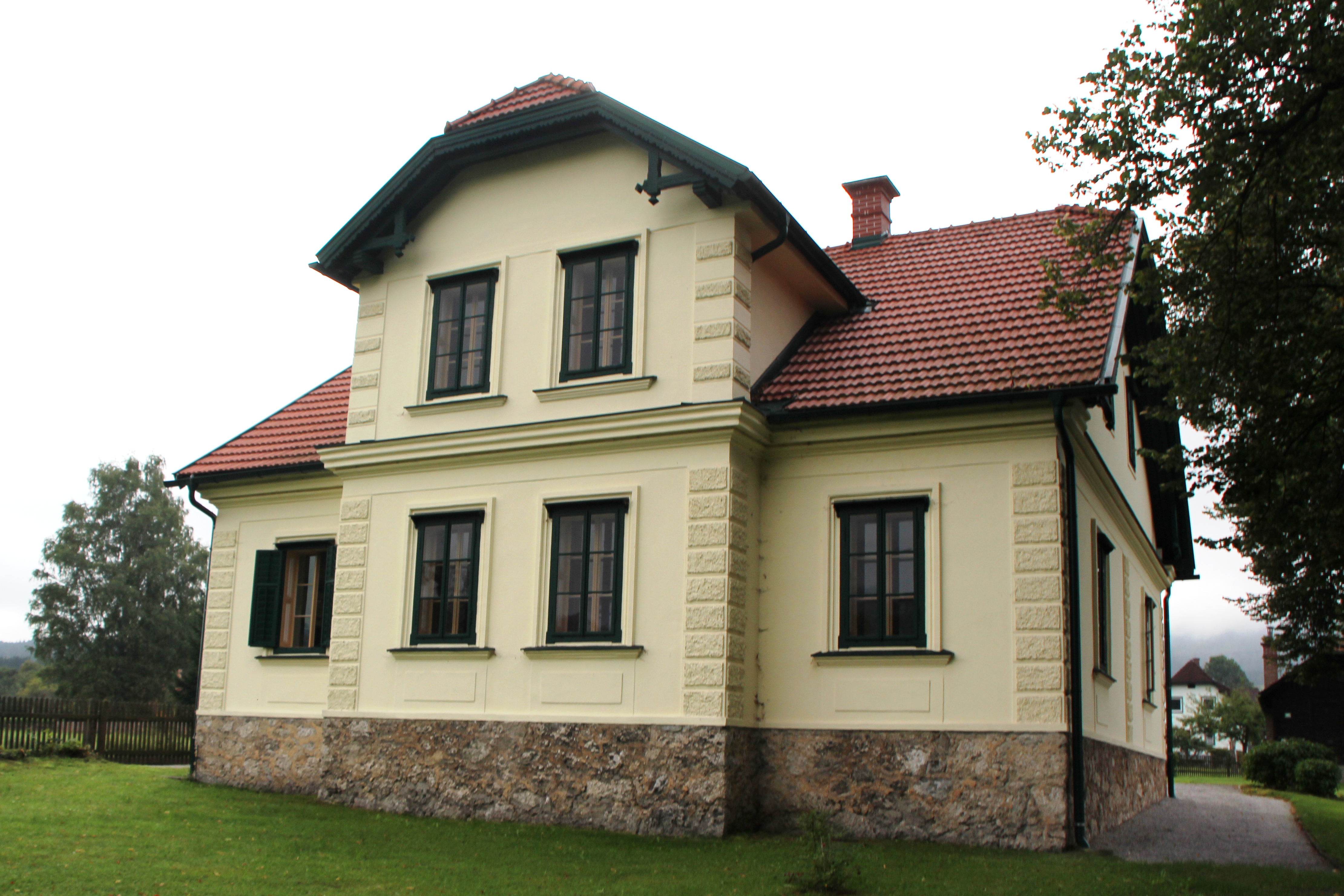 Wohn- und Sterbehaus Peter Roseggers